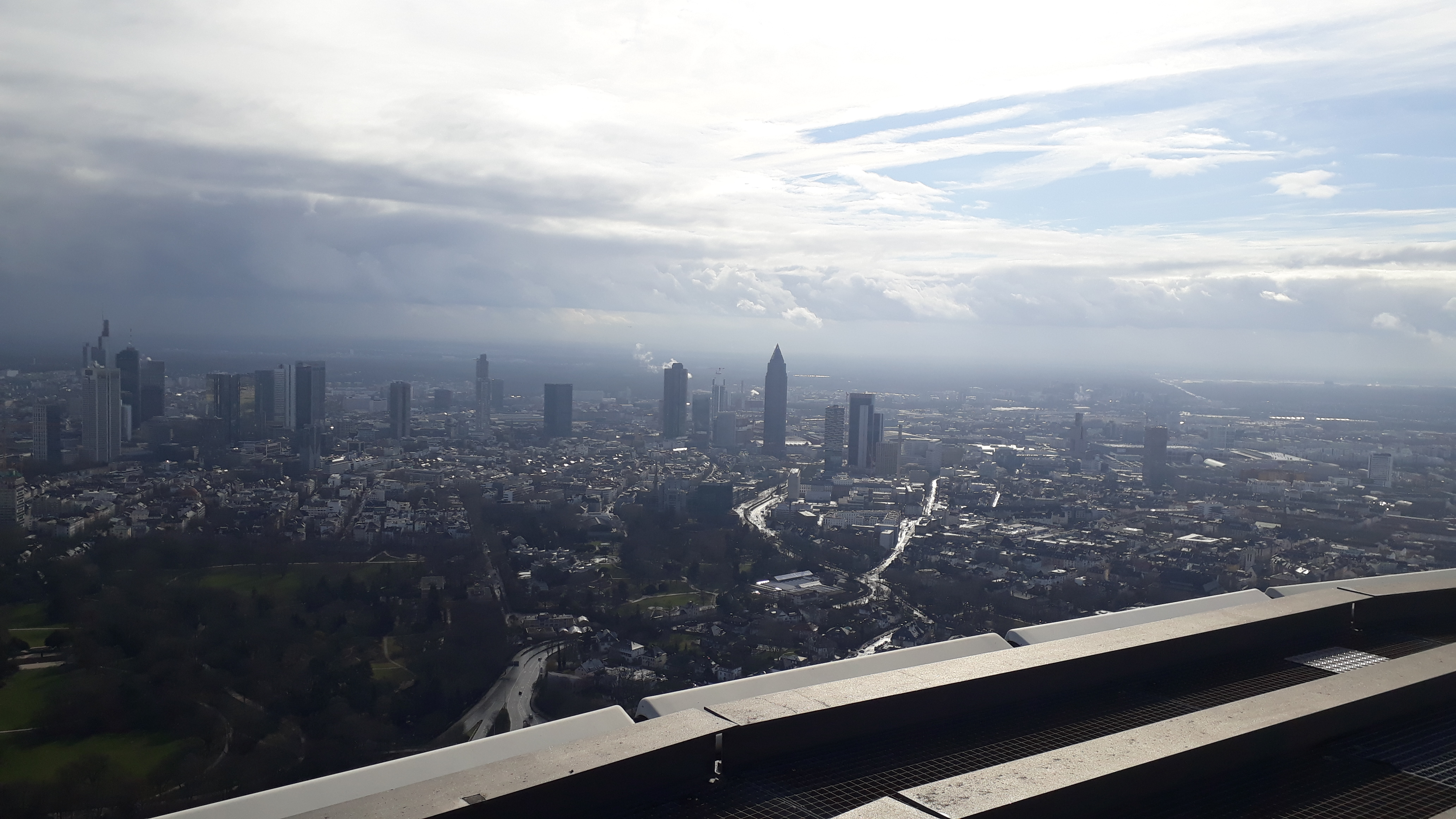 Blick vom Dach der großen Kanzel des Europaturmes gen Süden